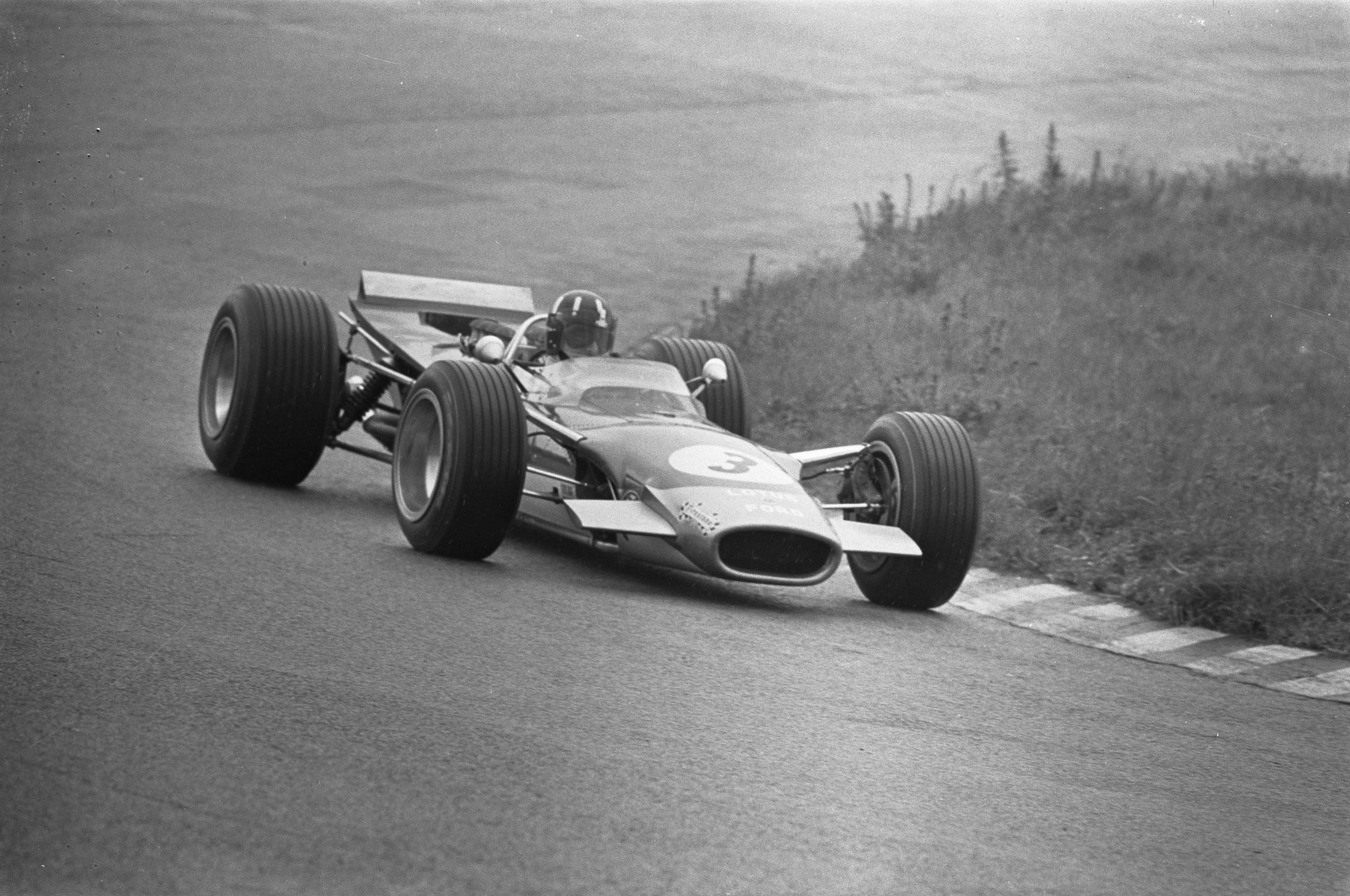 Grand Prix 68 Zandvoort . Nummers 8.10 Graham Hill , nummer 11 Jackie Stewart.